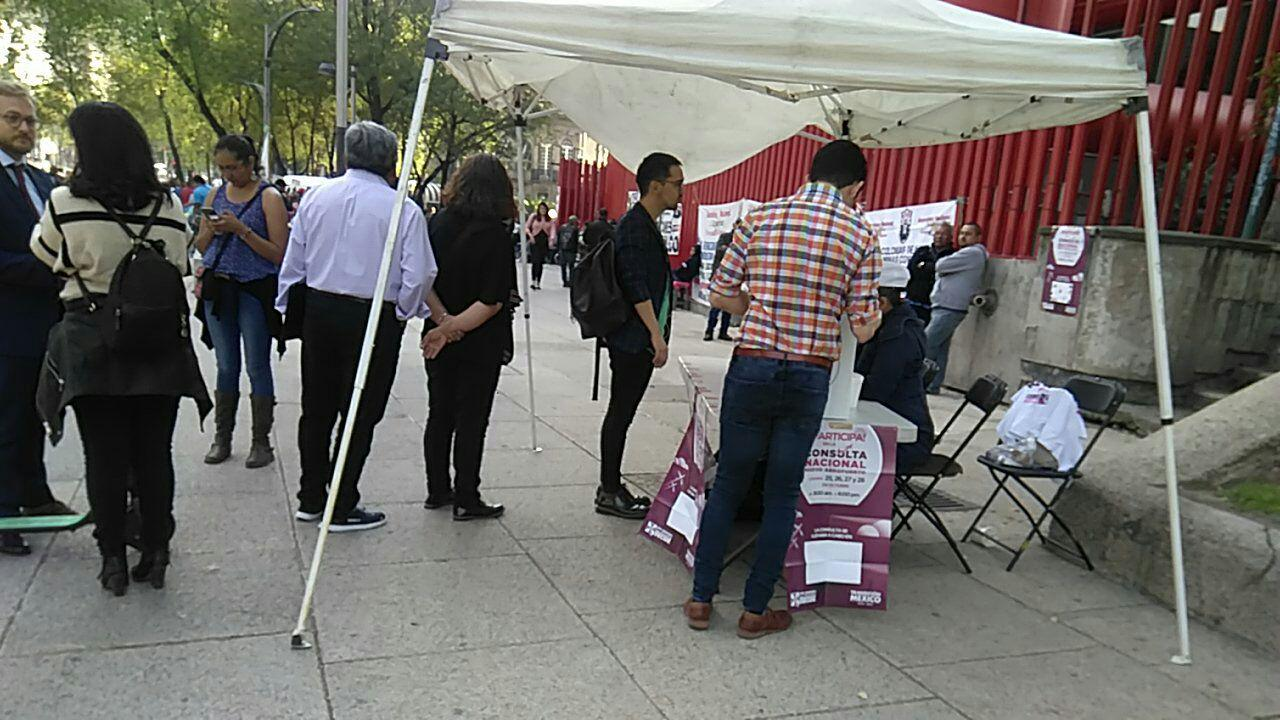 Consulta ciudadana, seguir en NAICM o en Santa Lucia